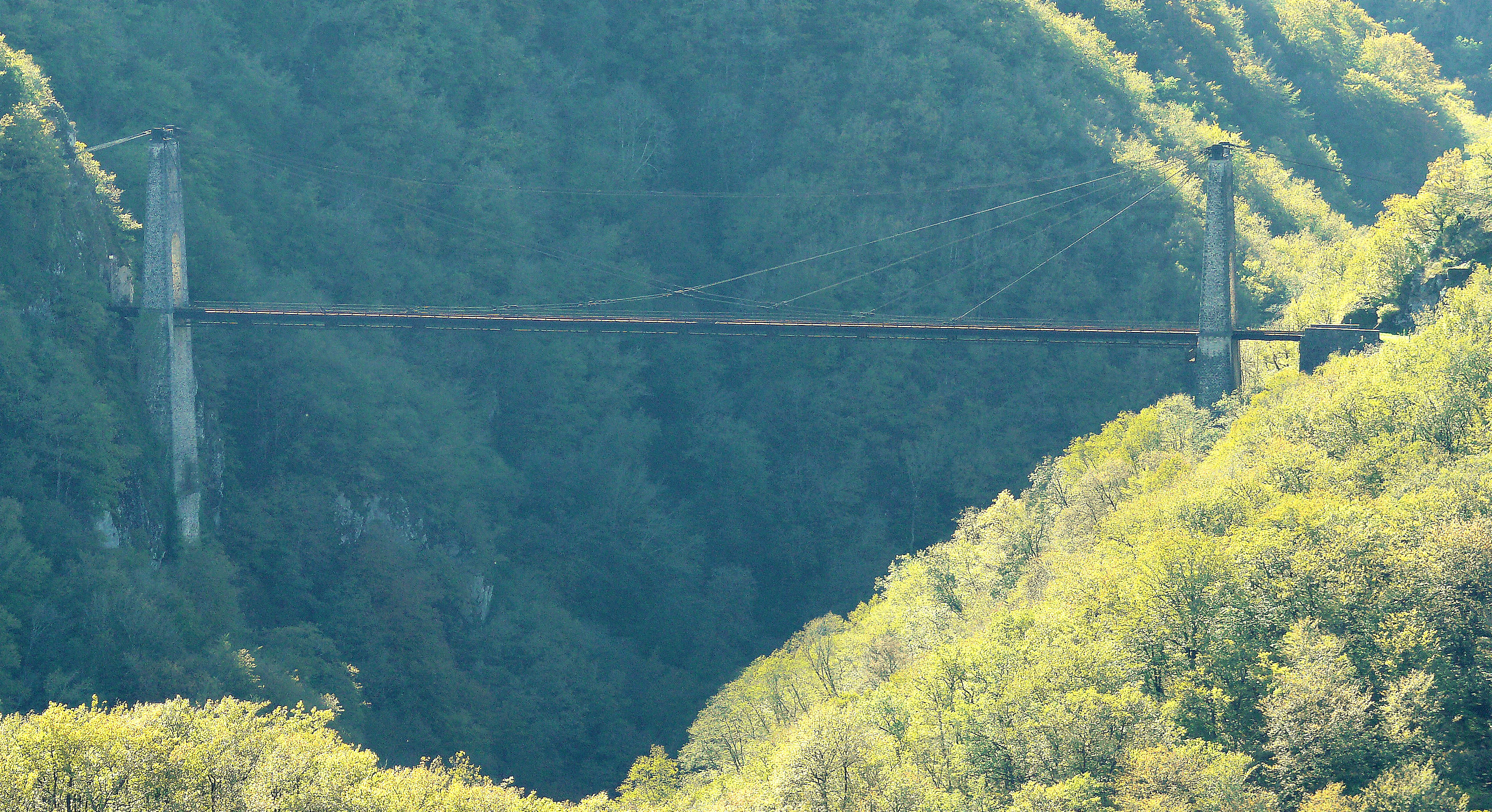 Soursac - Lapleau - Viaduc des Rochers Noirs